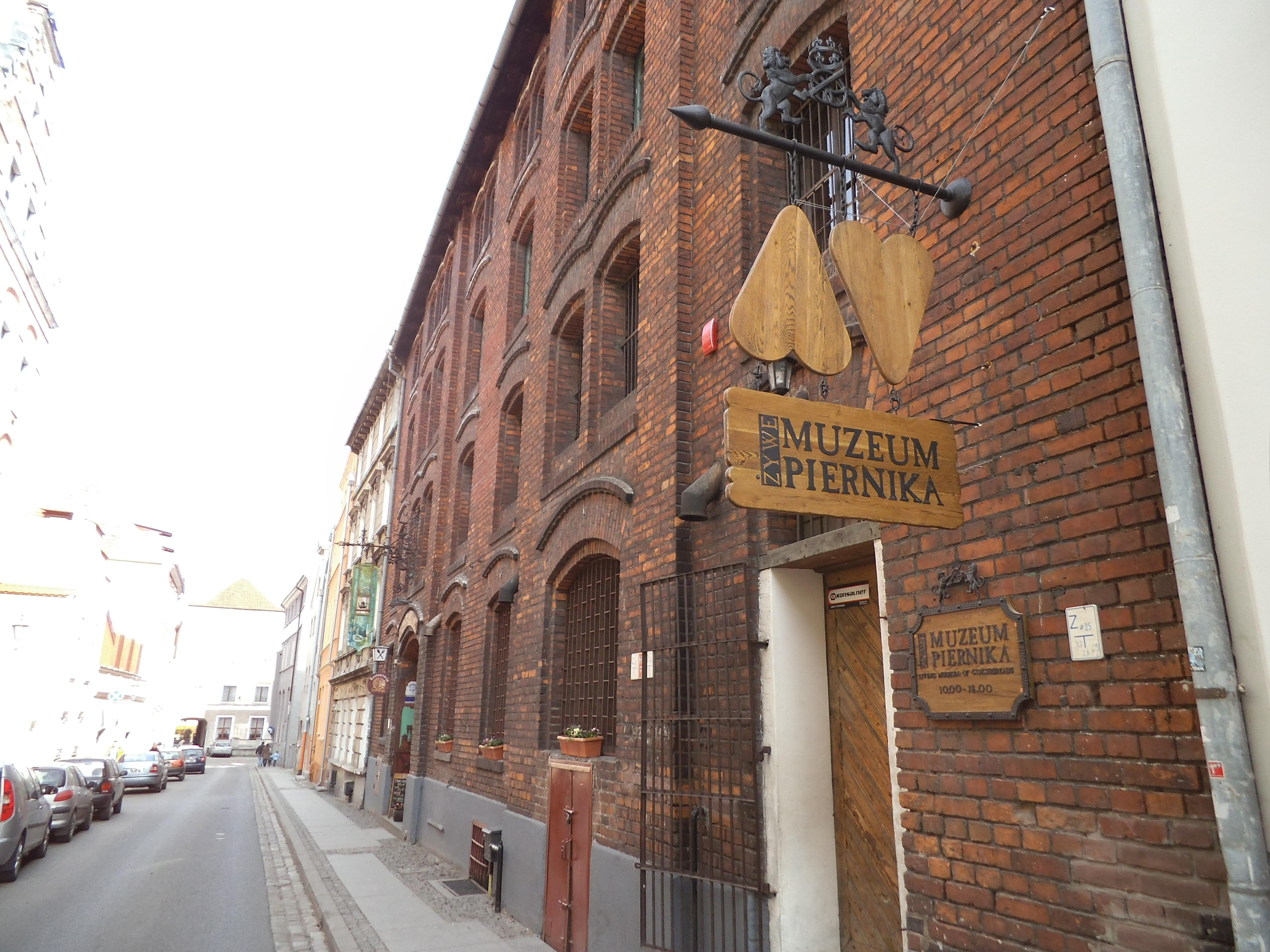 Żywa Muzeum Piernika w Toruniu